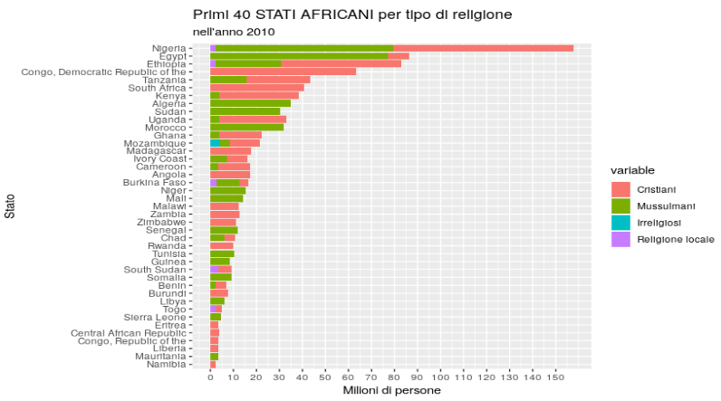 file realizzato con RStudio con i seguenti dati